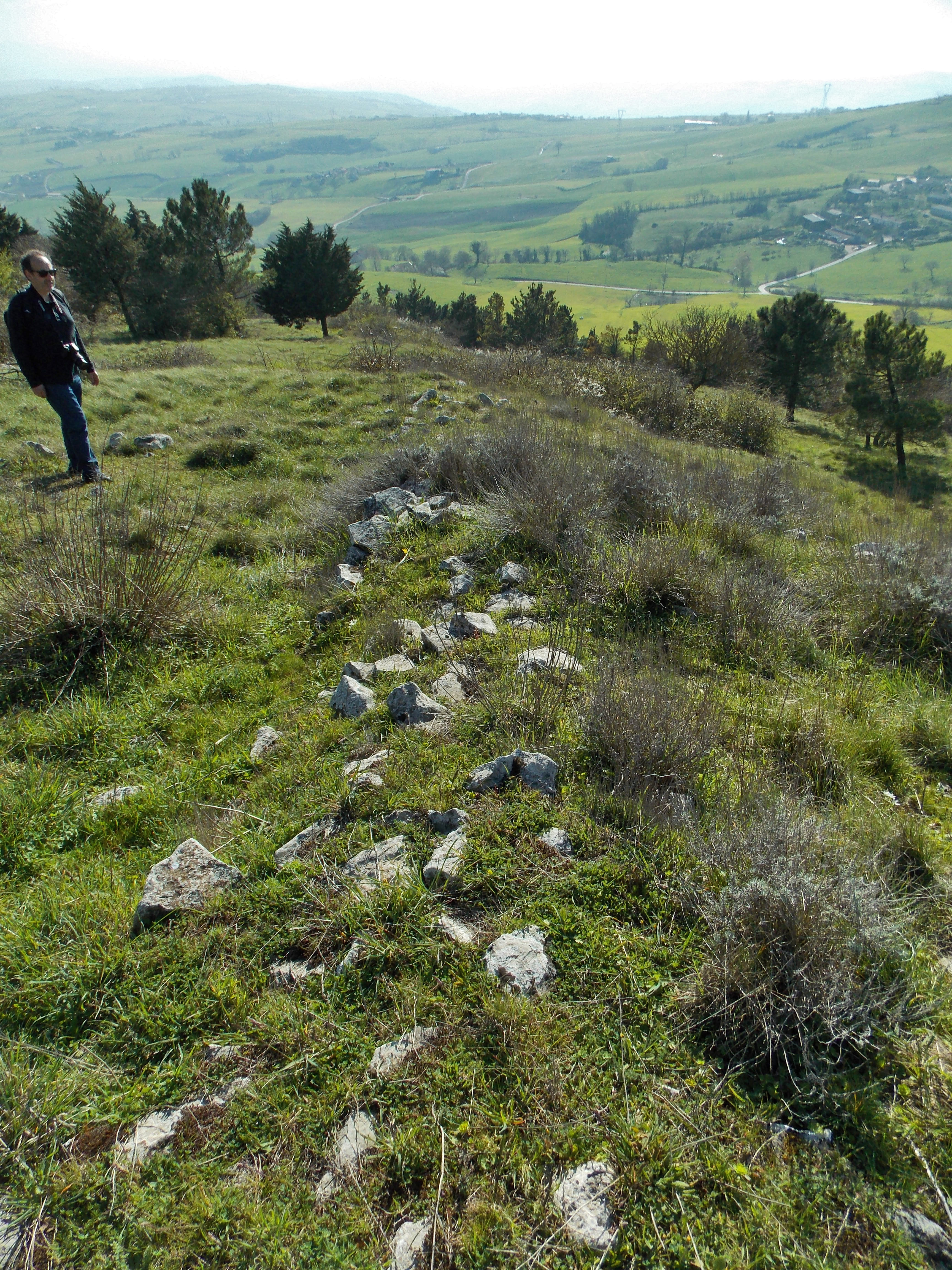 L'area archeologica di Monte Chiodo a Buonalbergo, in provincia di Benevento: un tratto di cinta muraria